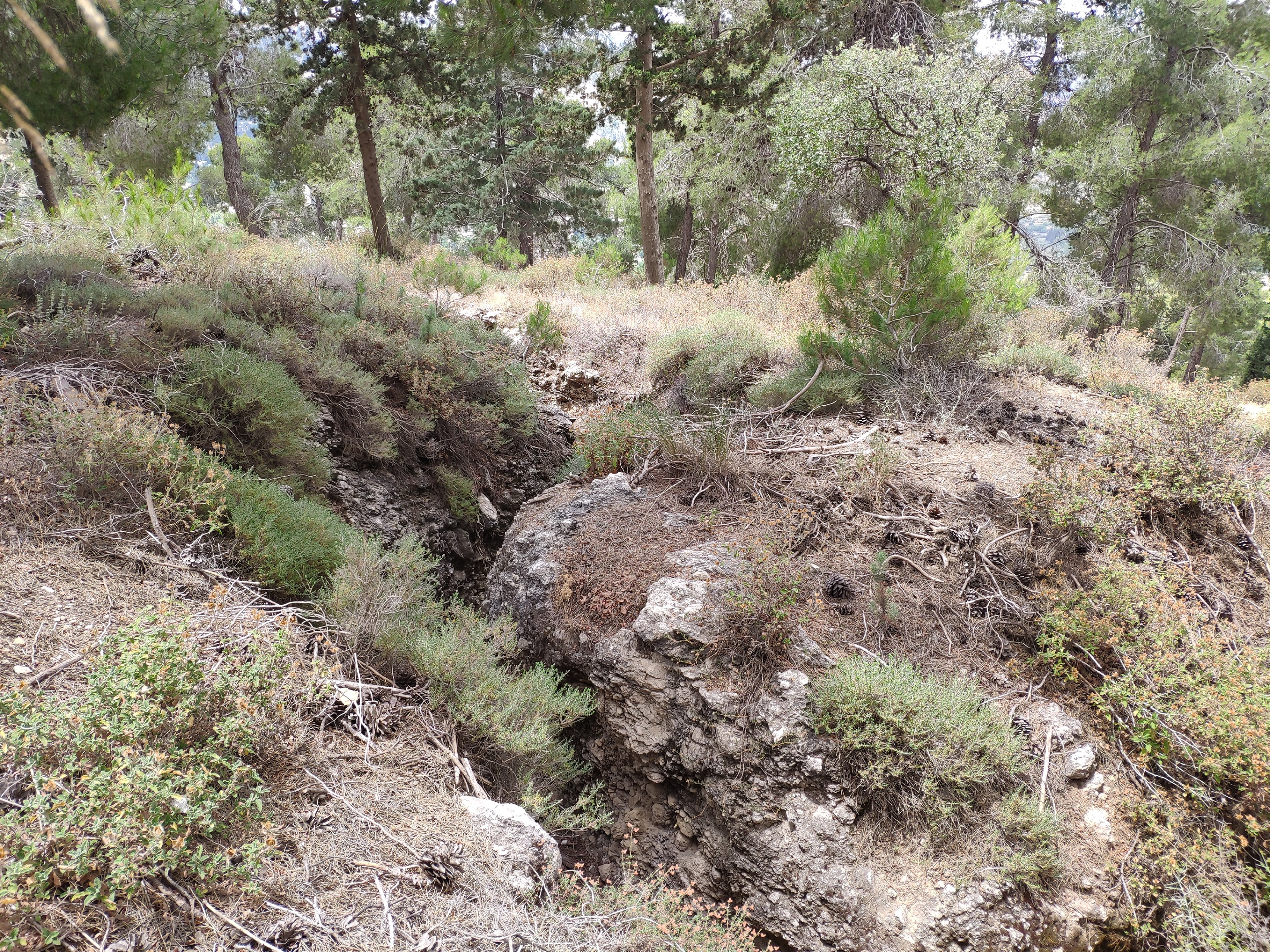 שוחות עות'מאניות ממלחמת העולם הראשונה באזור מצפה כרם, יער ירושלים